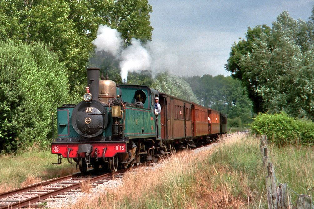 La Haine-St-Pierre n° 15 vient de quitter la gare de Lanchères et passe près du hameau de Herlicourt avec son train pour Cayeux.